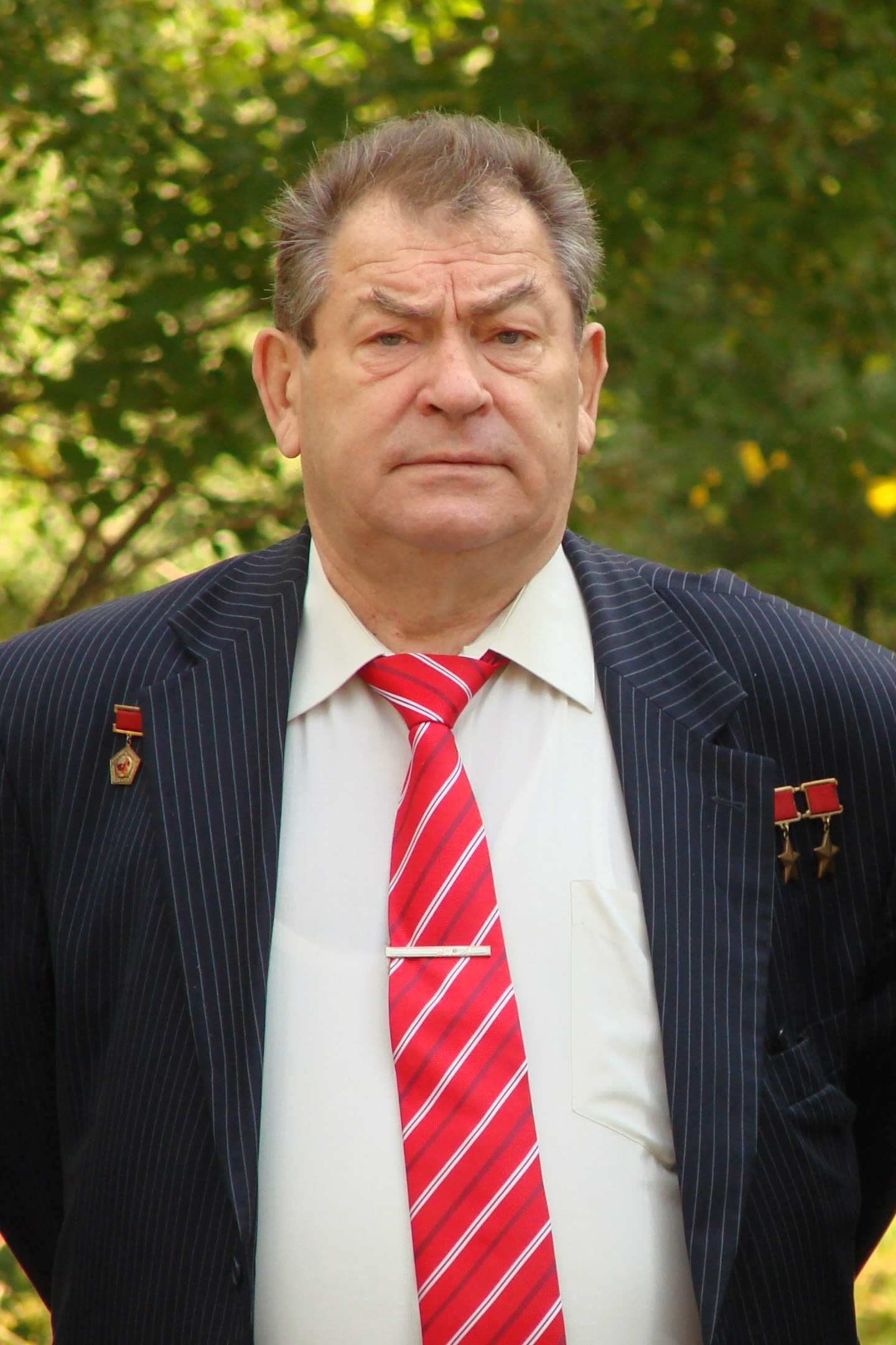 Дважды Герой Советского Союза космонавт Ковалёнок Владимир Васильевич в Вологде на одном из праздничных мероприятий в честь 50-летия полета Юрия Гагарина в космос.